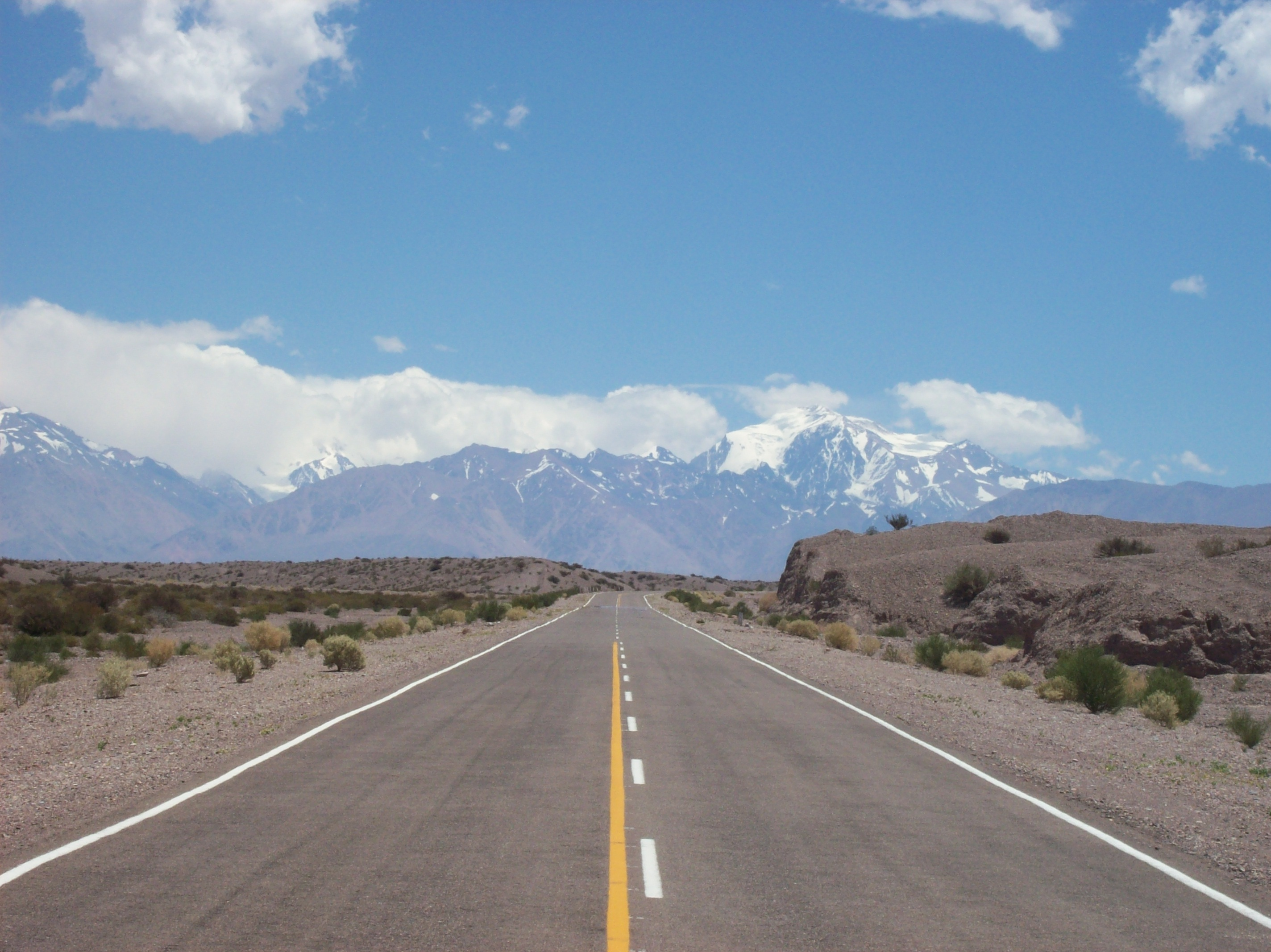 Ruta Nacional 149 entre Calingasta y Barreal, Provincia de San Juan, Argentina. Al fondo, Cordillera de Ansilta.